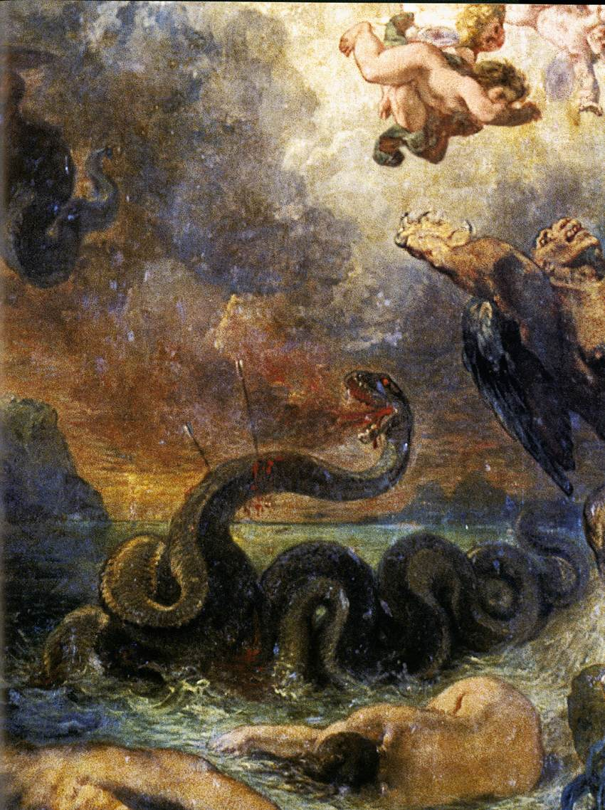 detail